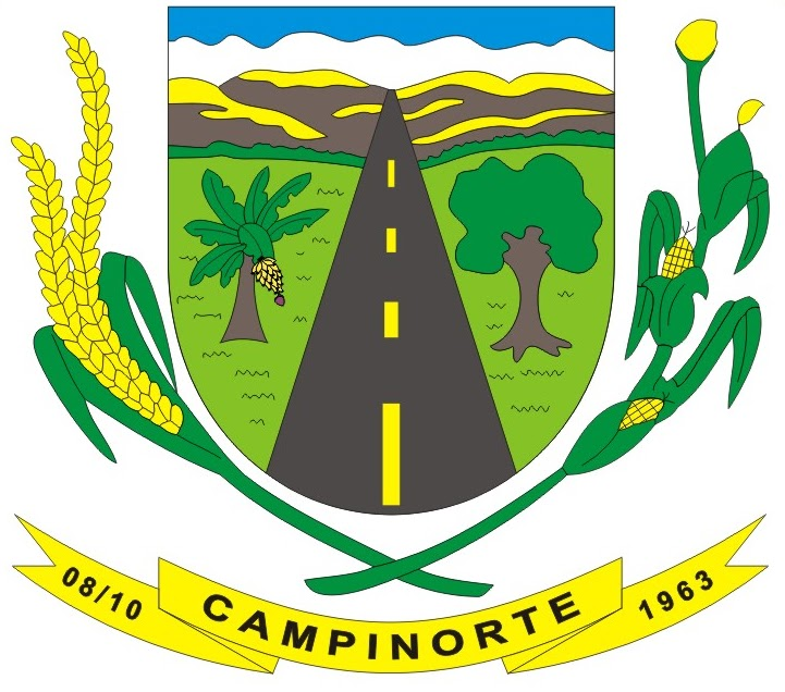 Brasão do Município de Campinorte, Goiás, Brasil